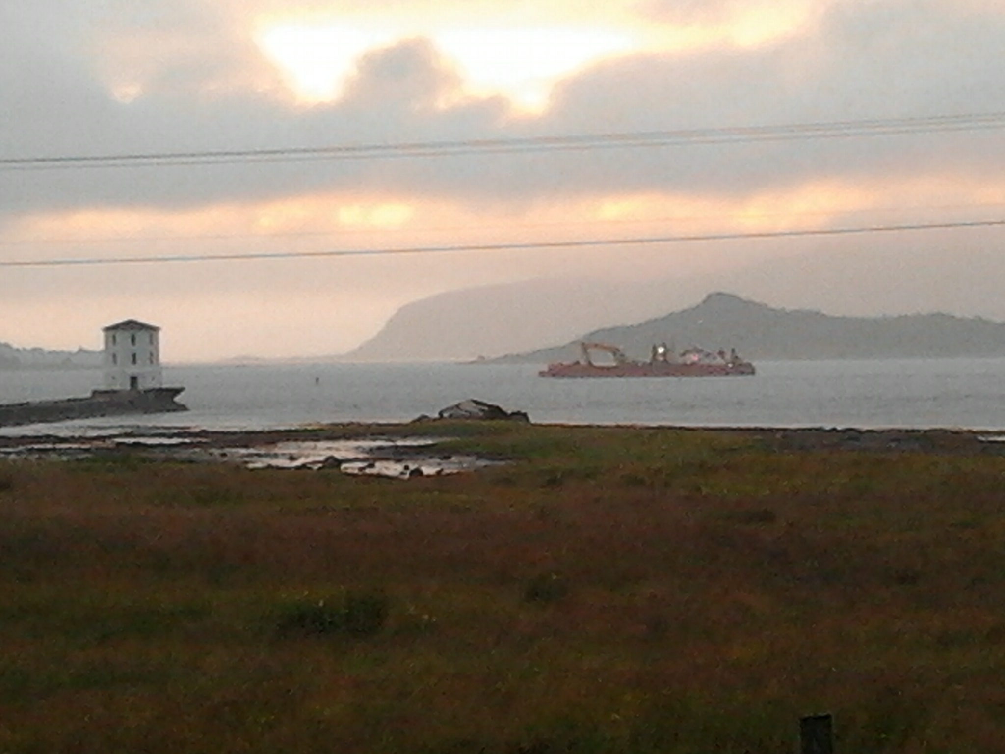 Muddring av Lepsøyrenna, Lepsøyrevet 2012